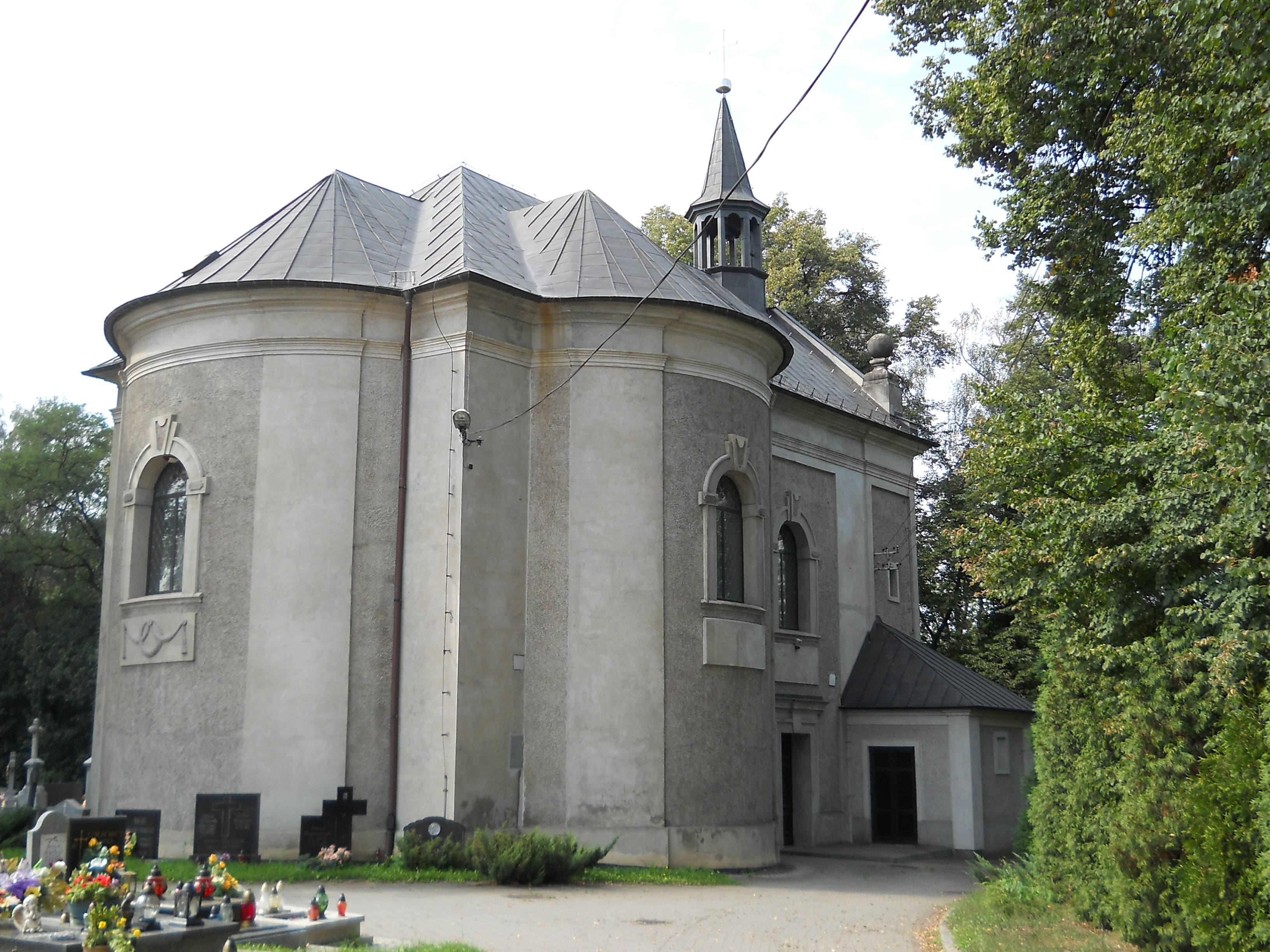 Toszek, ul, Parkowa - dawna kaplica cmentarna, obecnie kościół pw. św. Barbary (zabytek nr A/339/60 z 7.03.1960)